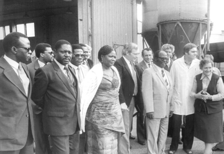 Bennewitz, Besuch einer kongolesischen Delegation ADN-ZB Gahlbeck ri-22.9.82 Bez. Leipzig: Besuch Parlamentarier aus der VR Kongo-Eine Delegation der Nationalen Volksversammlung der VR Kongo unter Leitung von Präsident Jean Ganga-Zanzou (3.v.r.) besuchte die LPG "Ernst Thälmann" in Bennewitz. LPG-Vorsitzende Frieda Starnberg (r) führte die Gäste durch rekonstruierte Milchviehanlagen.